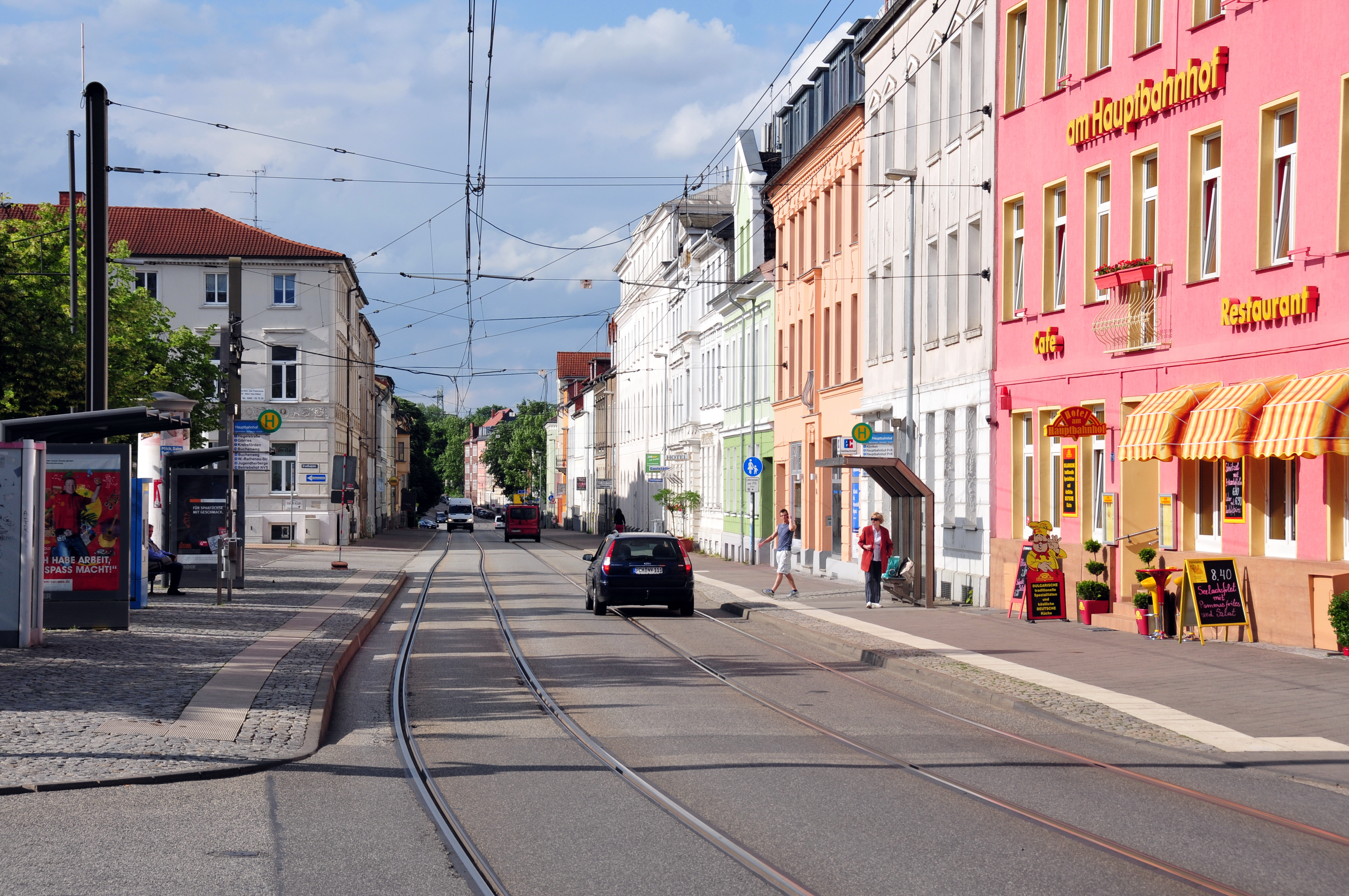 Schwerin; mit 50mm Brennweite von der Orangerie zum Bahnhof am Bahnhof angekommen